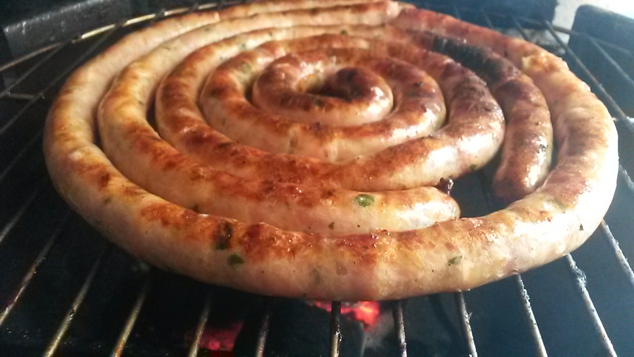 Linguiça de frango fina embutida em tripa ovina feita para publicação em